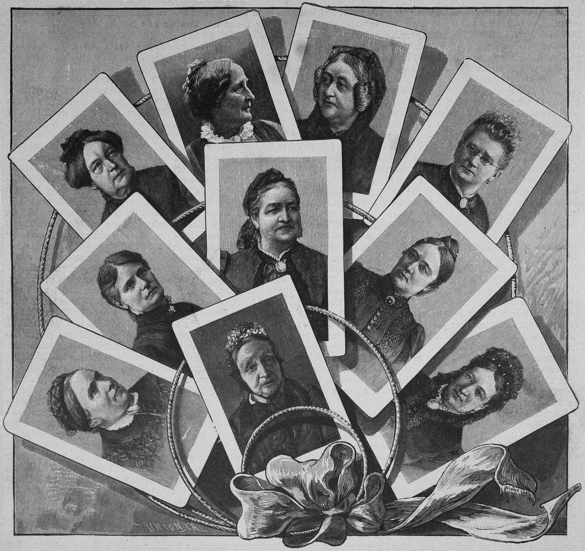 Ausschnitt aus dem Artikel Die Führerinnen der Frauenbewegung in Deutschland des Magazins Die Gartenlaube, Jahrgang 1894, Heft 4, S. 257.